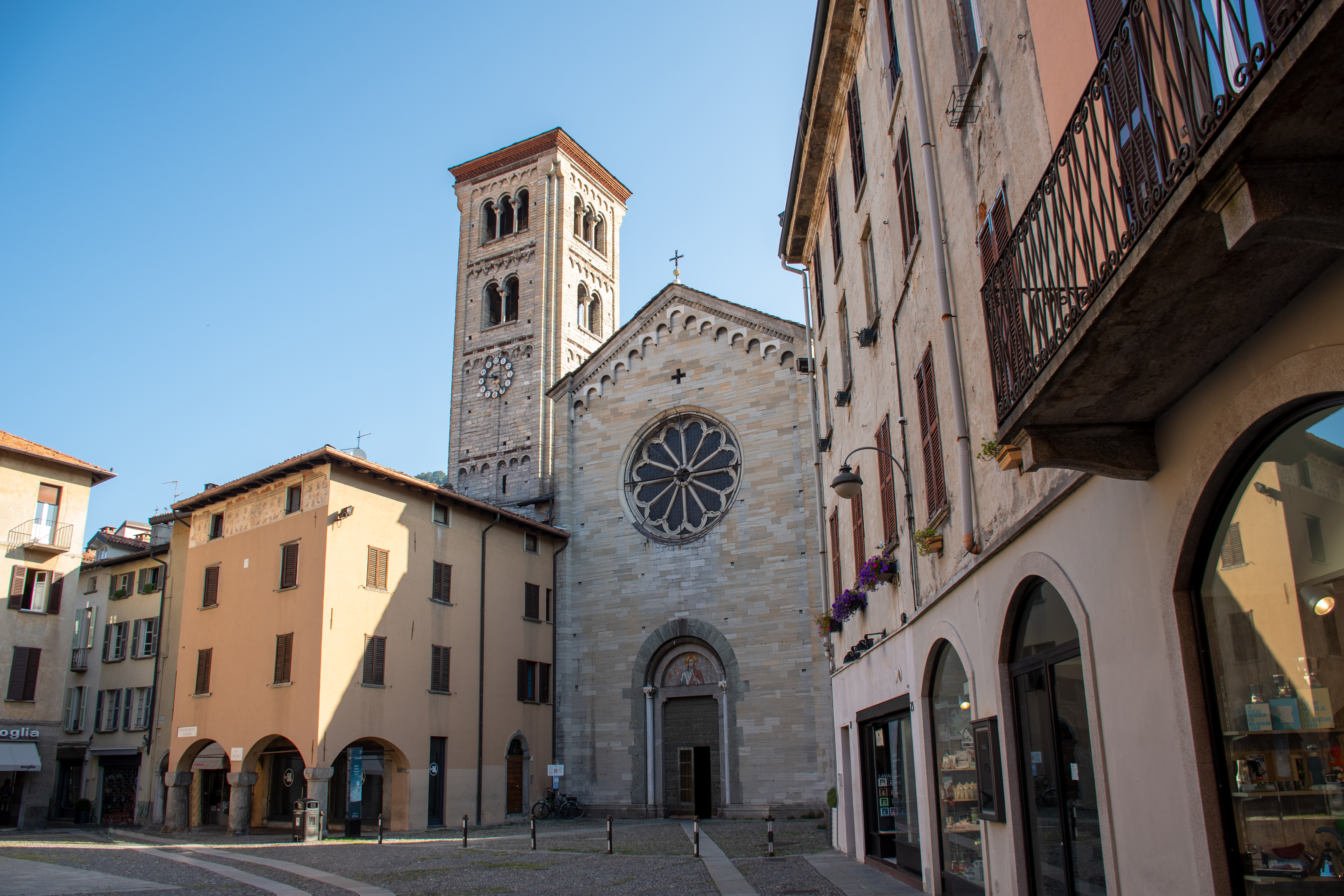 Chiesa di San Fedele a como e vista della piazza San Fedele